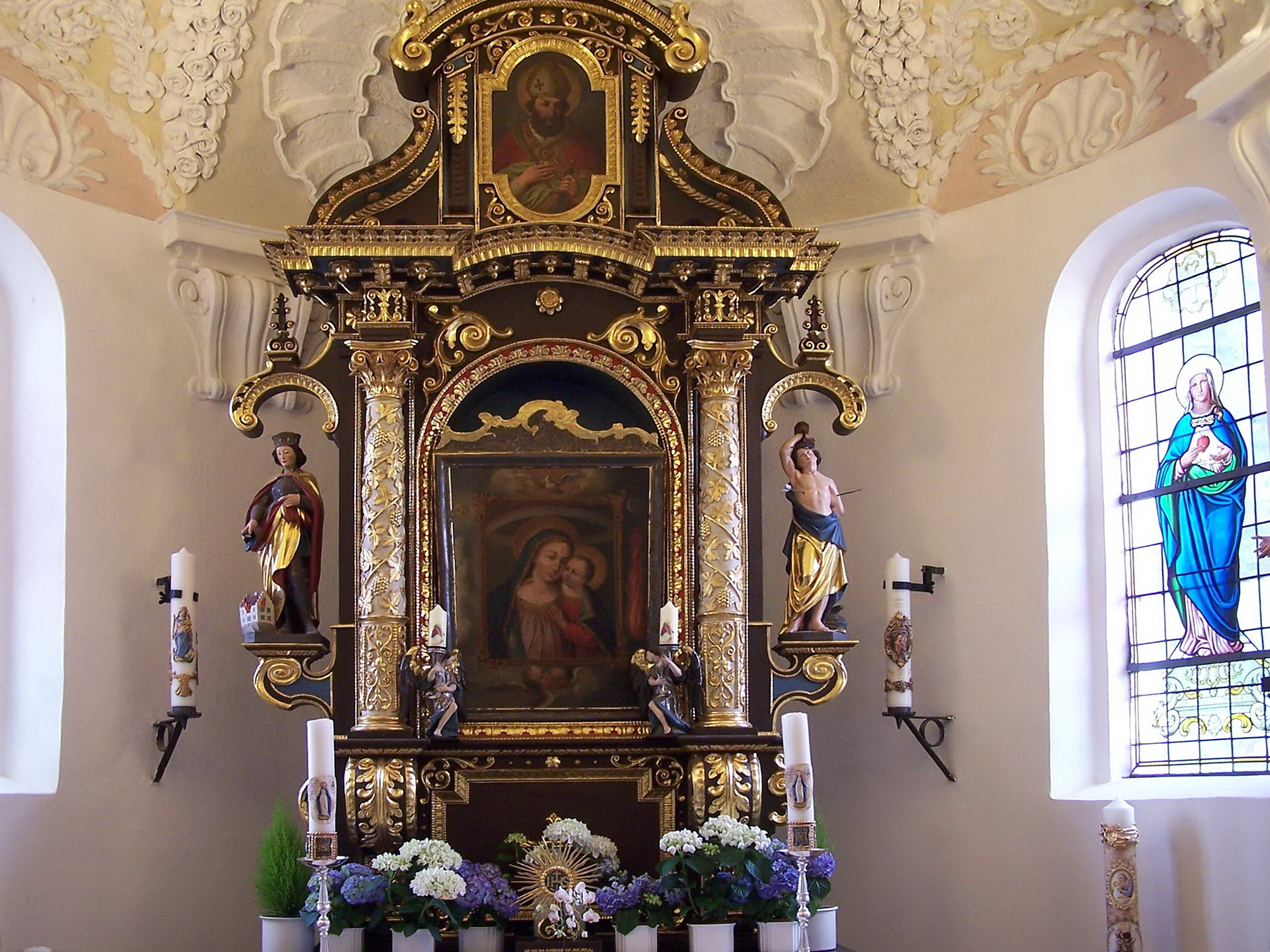 Wörth an der Isar. Landshuter Straße 55. Katholische Pfarrkirche St. Laurentius. Im Ostchor Renaissance-Altar mit zwei Säulen. Im Zentrum das Gnadenbild der Mutter vom guten Rat. Seitenfiguren St. Florian und St. Sebastian. Das Oberbild zeigt einen hl. Bischof.